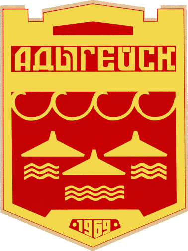 Герб г.Адыгейск